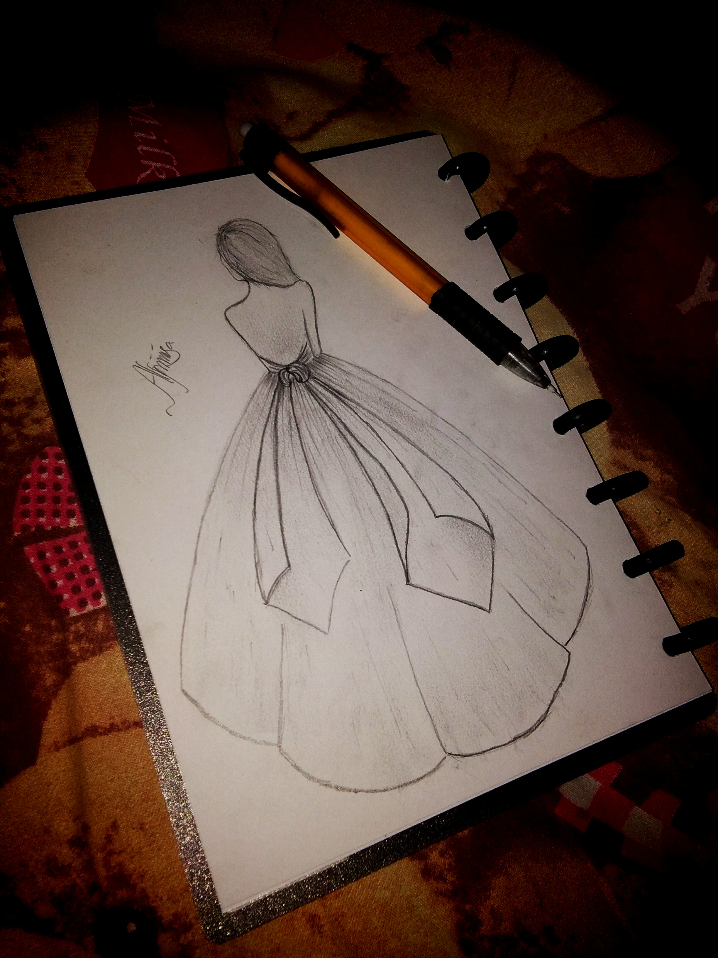 Basa Jawa: Gambar punika yaiku gambar sketsa gaun kang katujukaken kangge nglatih bakat utawi ingkang asring kasebut passion ingkang dipungadhahi.